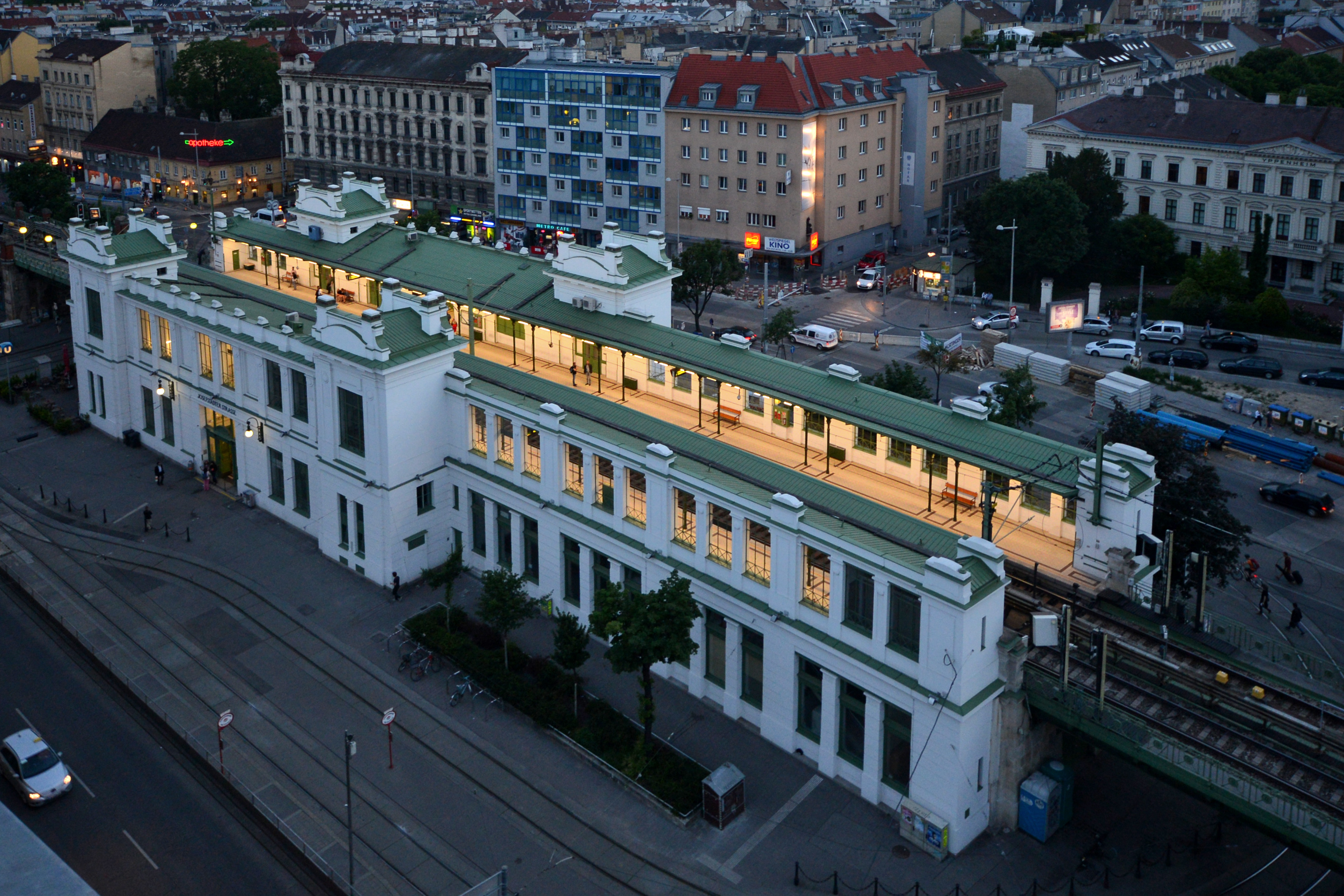 Blick vom Südturm der Pfarrkirche Breitenfeld auf die U-Bahn-Station Josefstädter Straße.